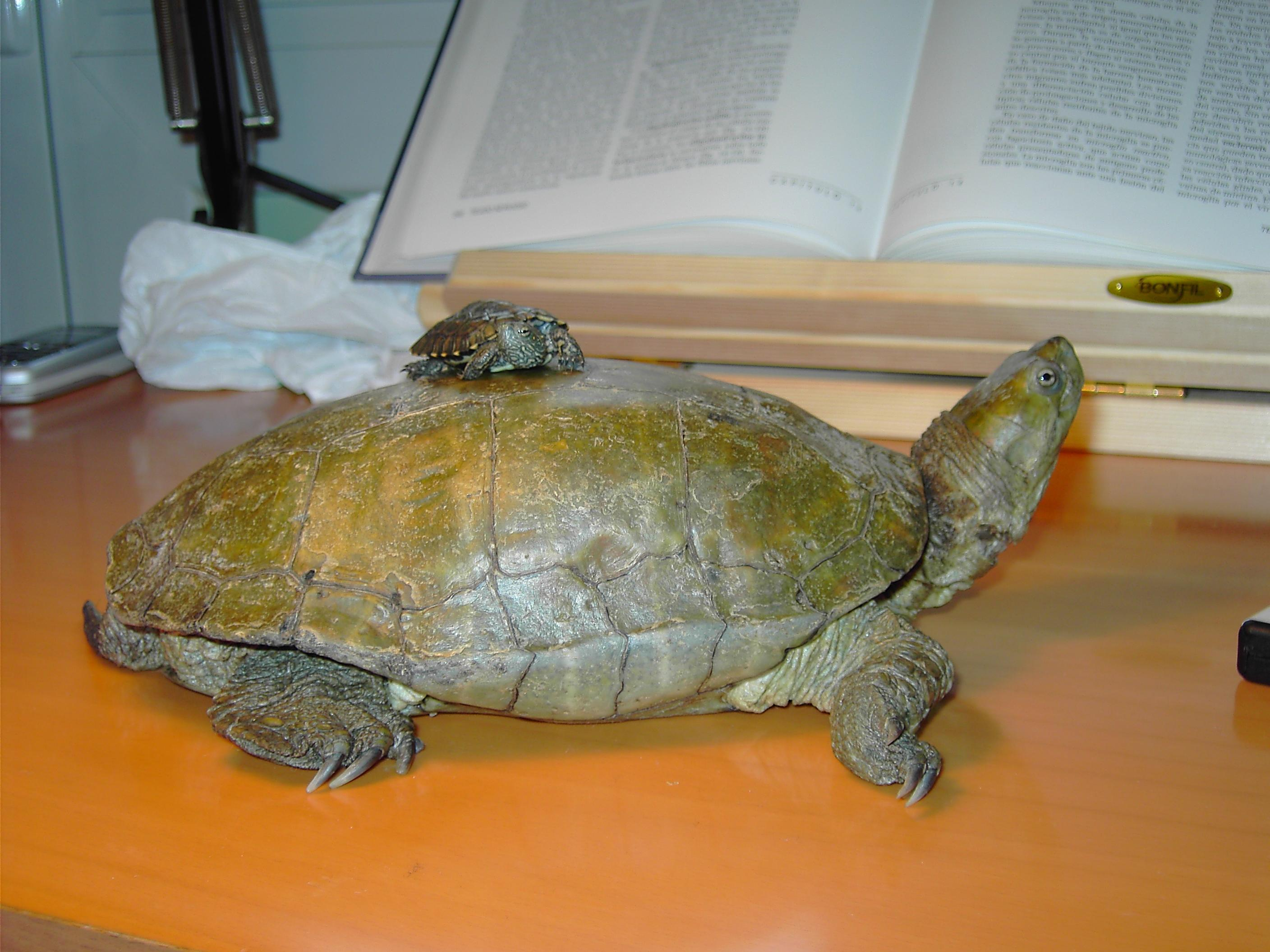 Hembra adulta y cría de Galápago leproso ibérico "Mauremys leprosa". Comparación de tamaños entre madre adulta y cría recién eclosionada. // Adult female and young of Spanish Water Turtle "Mauremys leprosa". Comparison between adult mother's size and a new born baby.